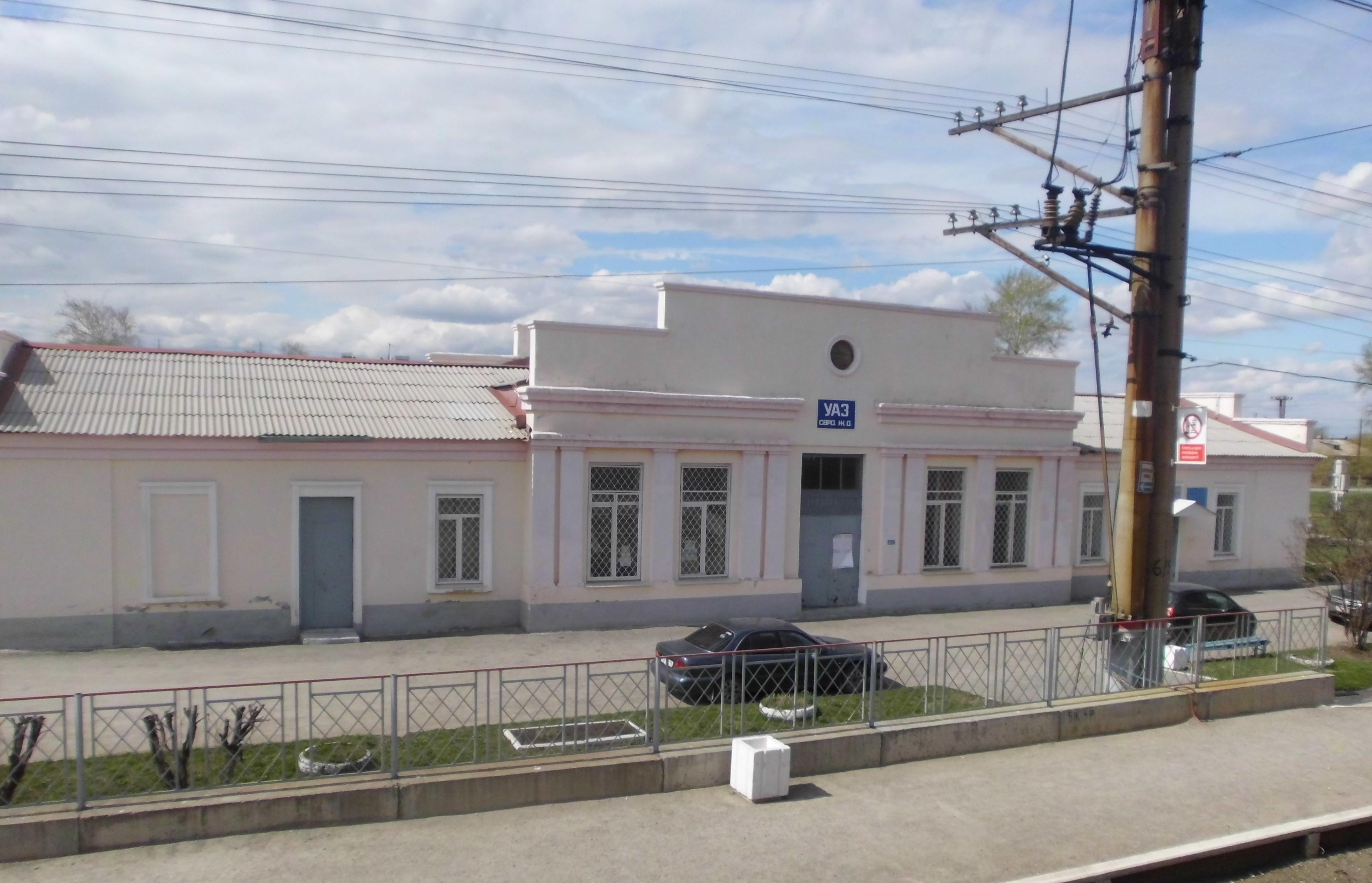 Железнодорожная станция УАЗ, Свердловская железная дорога, г. Каменс-Уральский. Россия